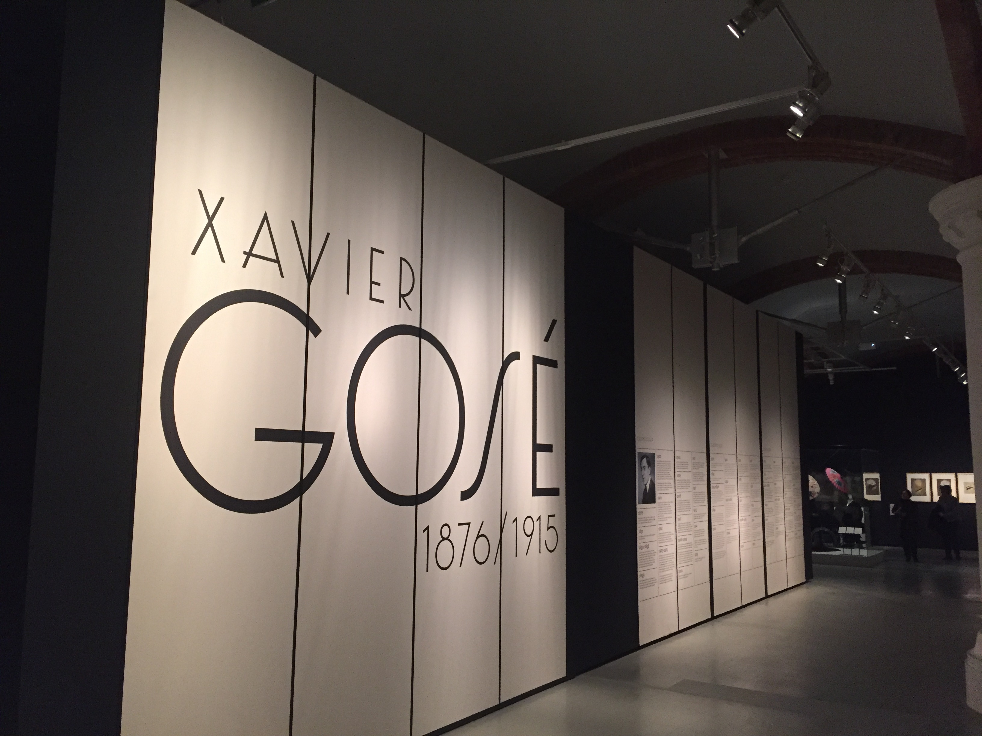 Xavier Gosé Expo MNAC